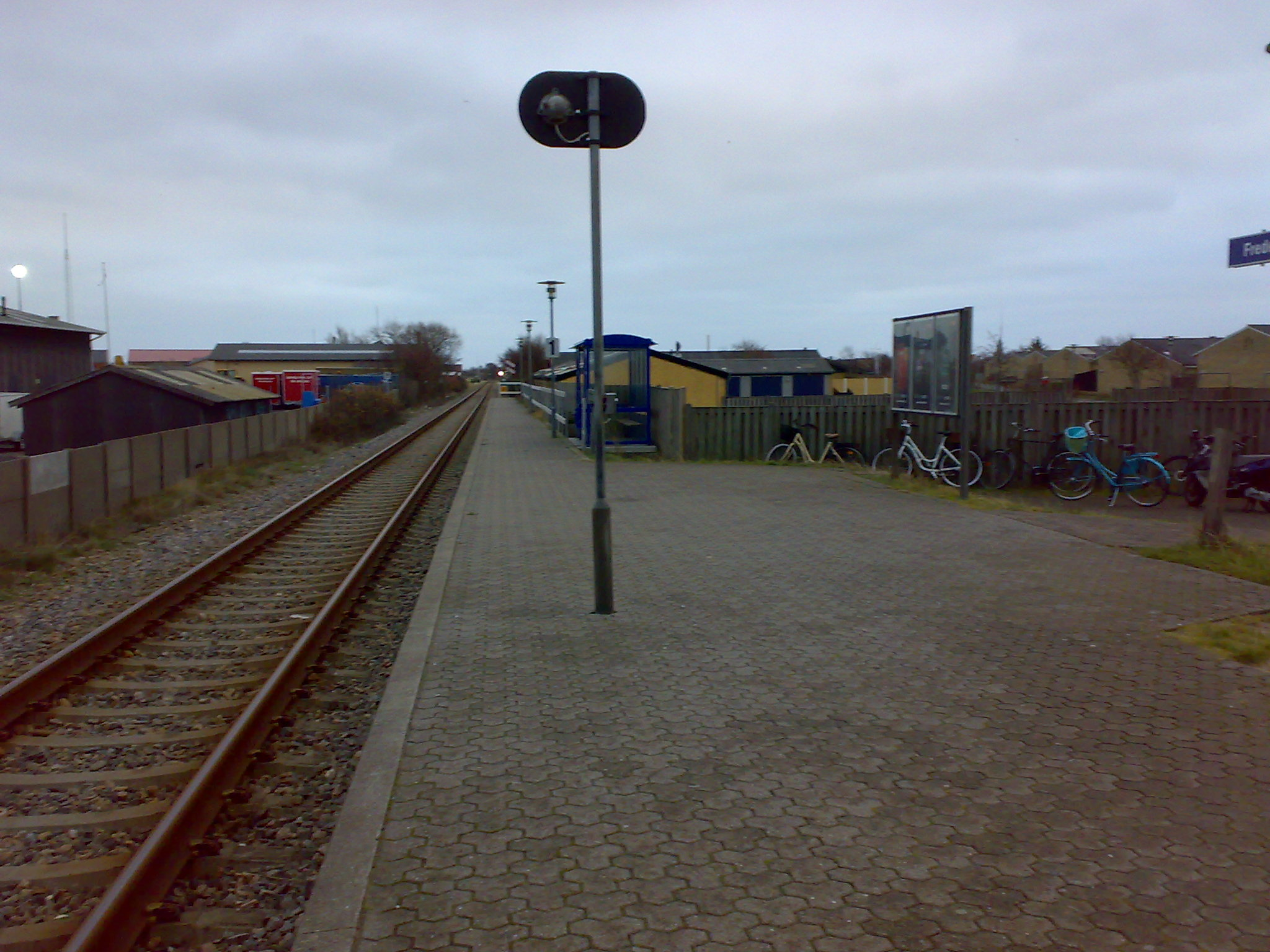 Frederikshavnsvej Station